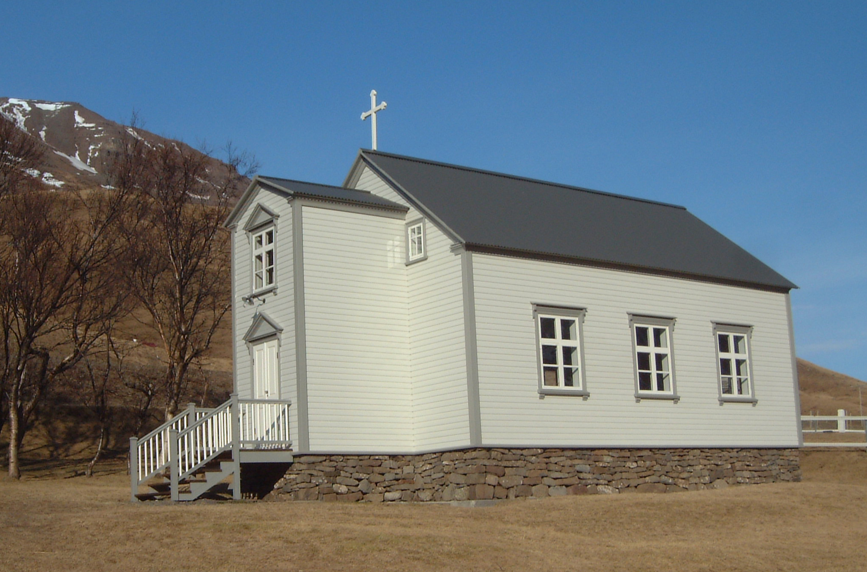 Urðakirkja in Svarfaðardalur Iceland